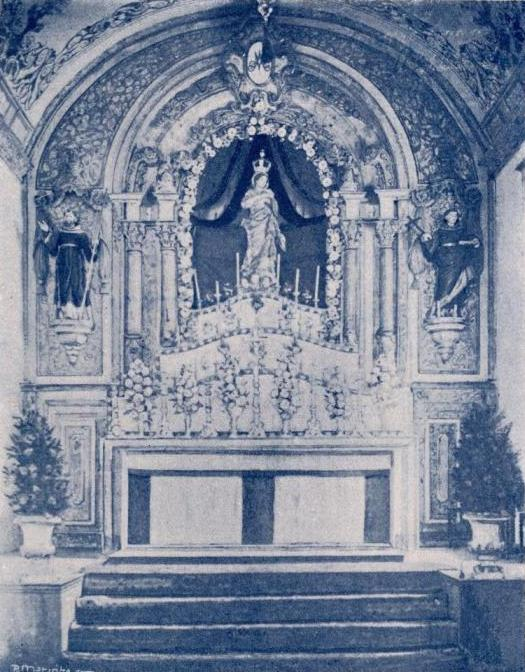 "Convento dos Franciscanos - Capella-Mór", freguesia e concelho de Vila do Porto, ilha de Santa Maria, Açores, in Álbum Açoriano, fascículo nº 33, 1903, p. 259.